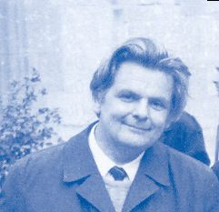 Michel van Esbroeck (1934-2003), Bollandiste